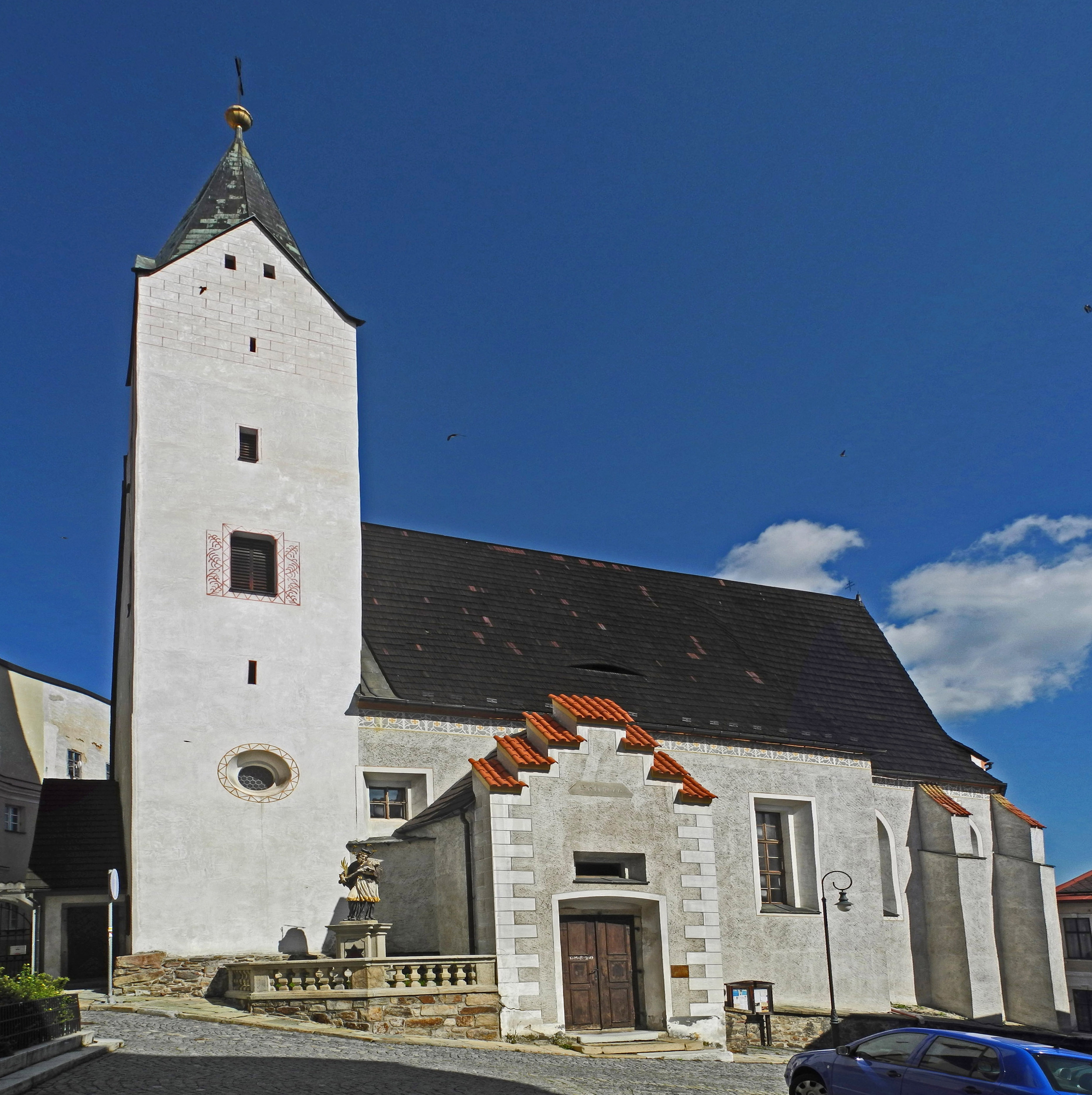 Pfarrkirche Mariä Heimsuchung in Winterberg (Vimperk) im Böhmerwald